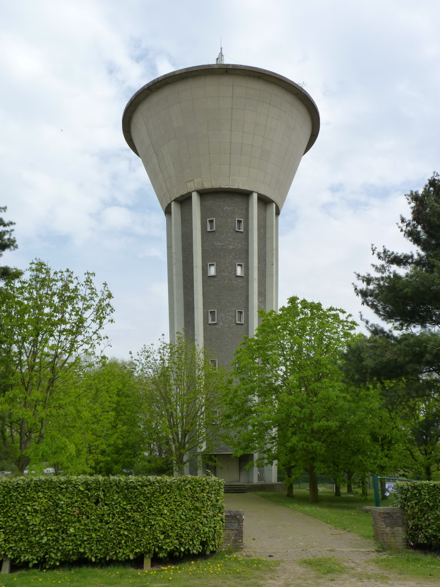 Meerhout Watertorenstraat Watertoren